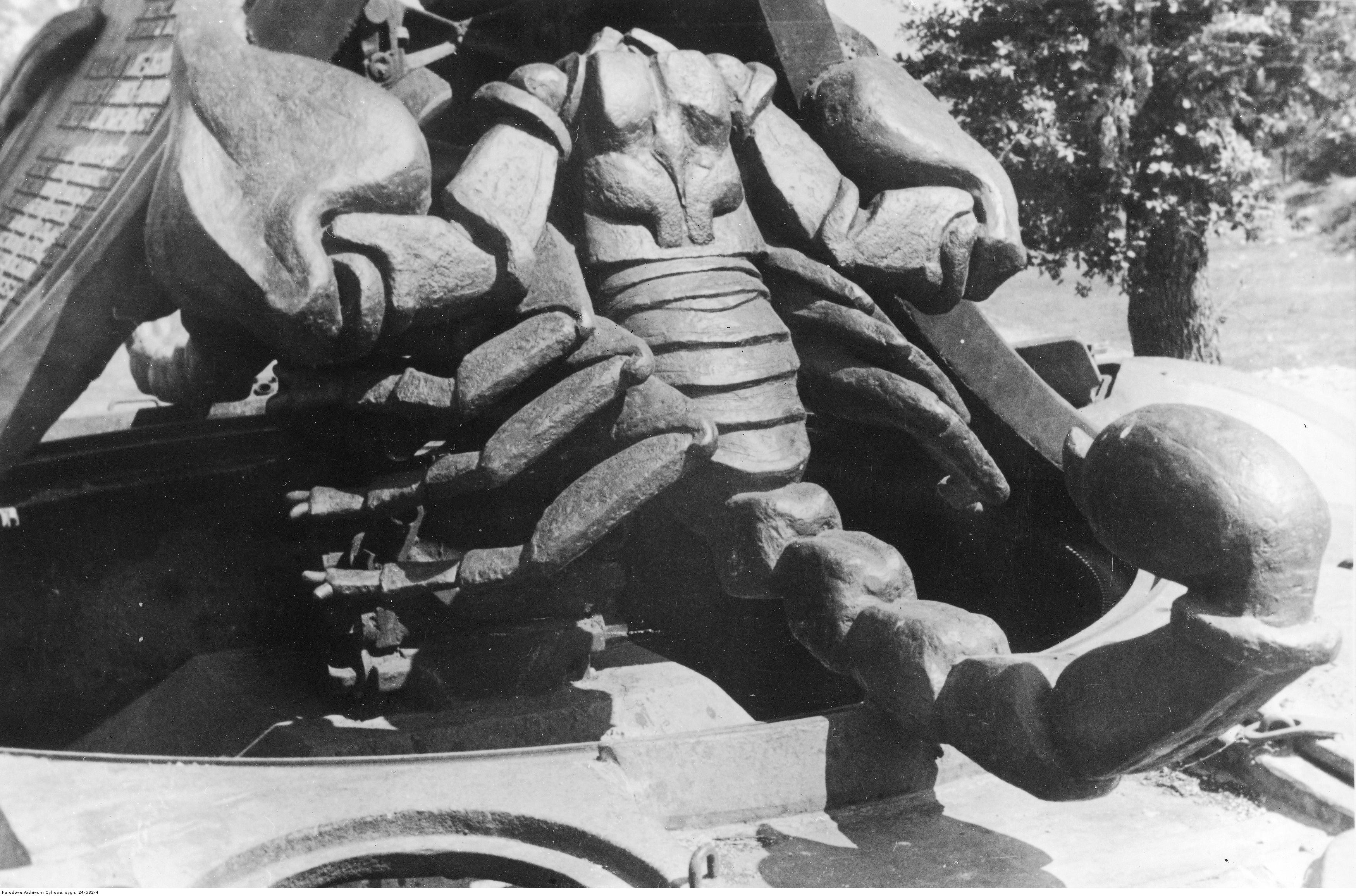 Pomnik 4 Pułku Pancernego "Skorpion" w "Gardzieli" pod Monte Cassino. Spiżowy skorpion - symbol 4 Pułku Pancernego. Archiwum Fotograficzne Tadeusza Szumańskiego. Sygnatura: 24-582-4